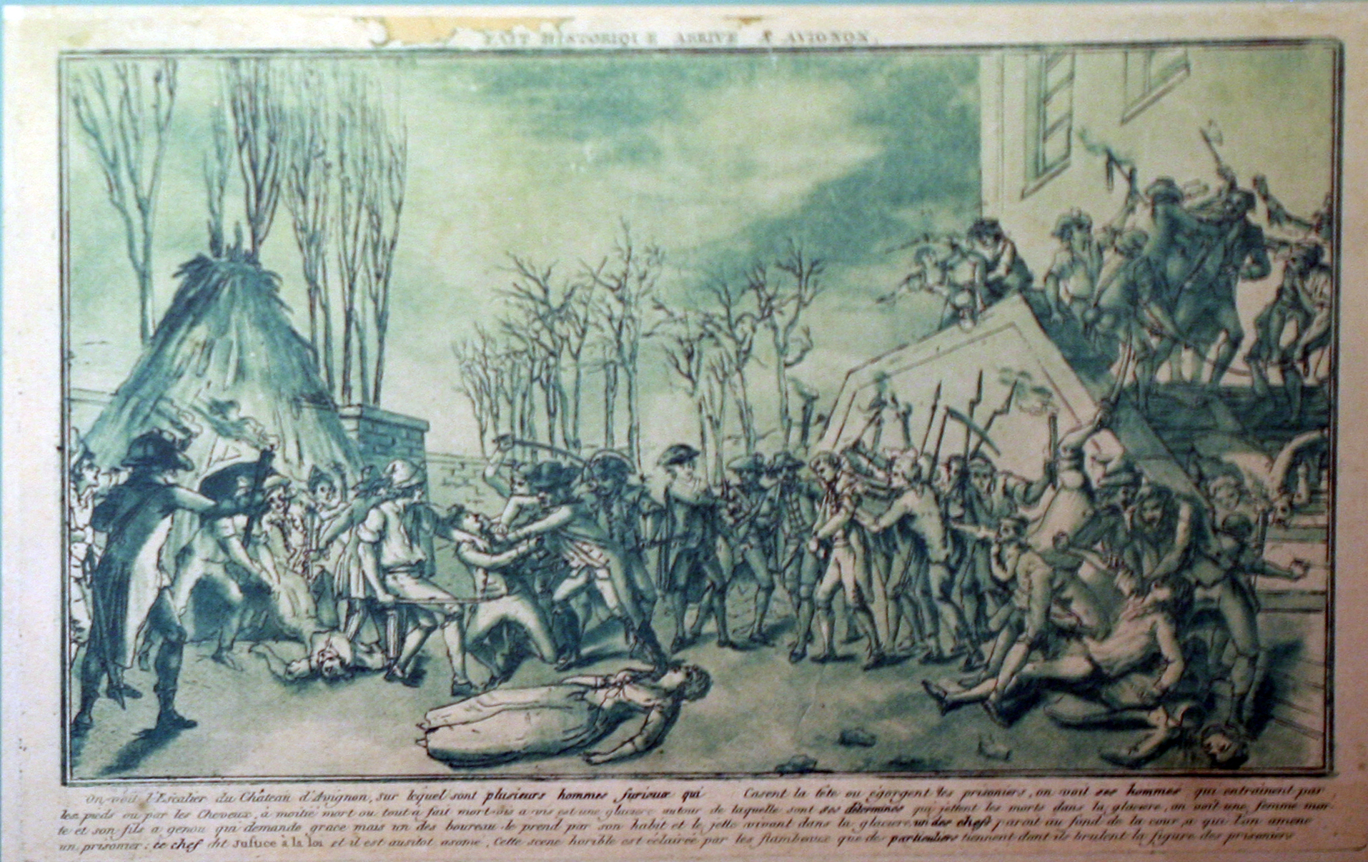 Illustration du massacre de la glacière - Palais des Papes, Avignon, Vaucluse, France